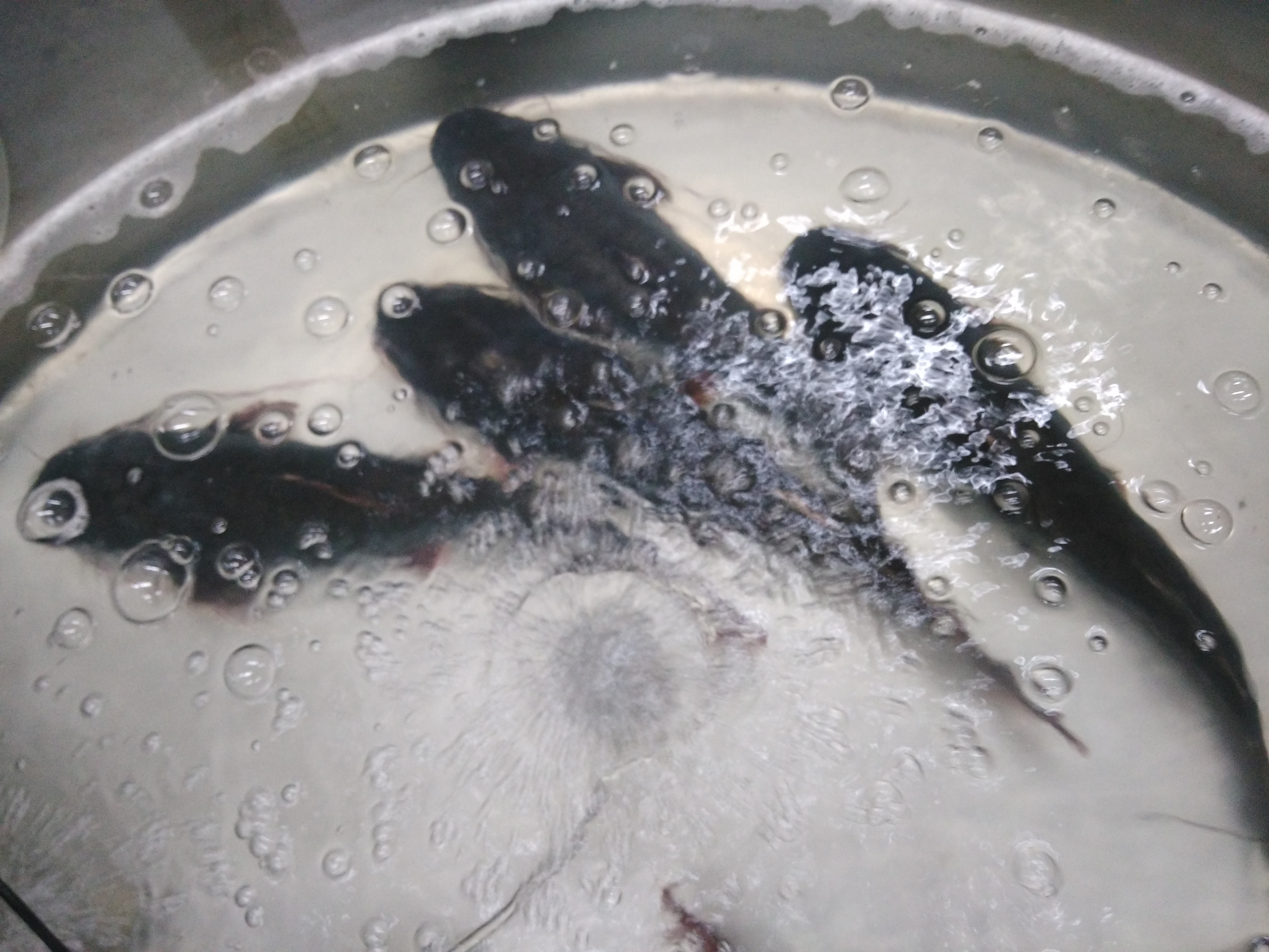 Cá hú ở siêu thị